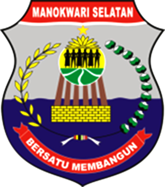 Lambang Kabupaten Manokwari, Provinsi Papua Barat, Republik Indonesia.